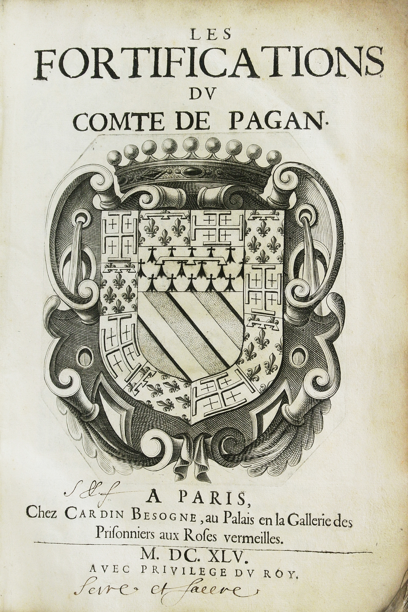 Les Fortifications Du Comte De Pagan / Blaise Francois de Pagan. Paris: Besogne, 1645. Wissenschaftliche Stadtbibliothek Mainz. Signatur: III g : 2° / 360